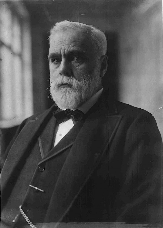 Alfred Nobel, schwedischer Erfinder, Porträt